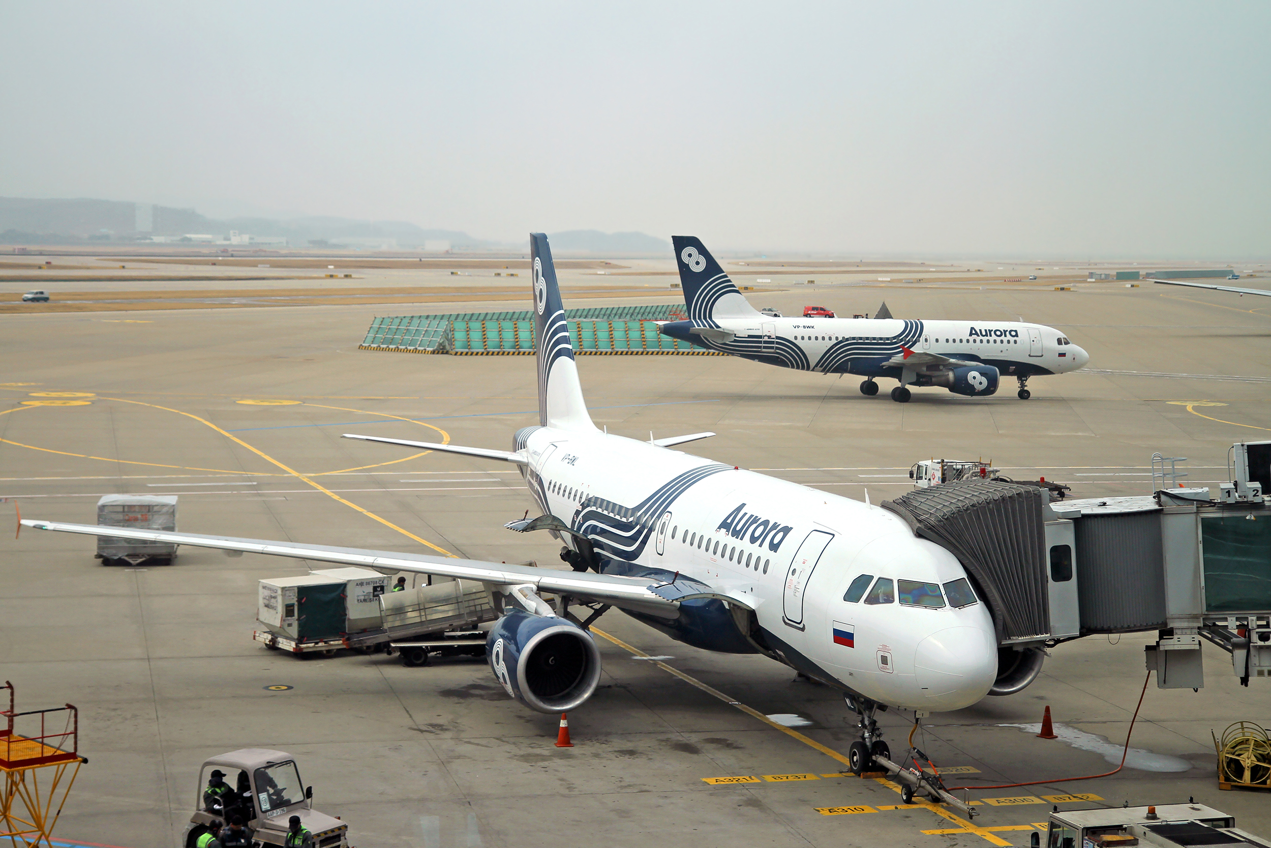 Два самолета A319 авиакомпании "Аврора" в аэропорту Инчон (Южная Корея)